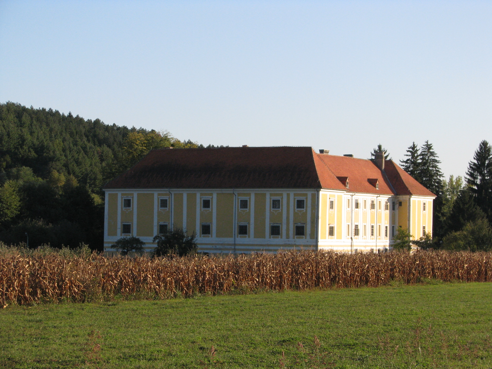 Loborgrad